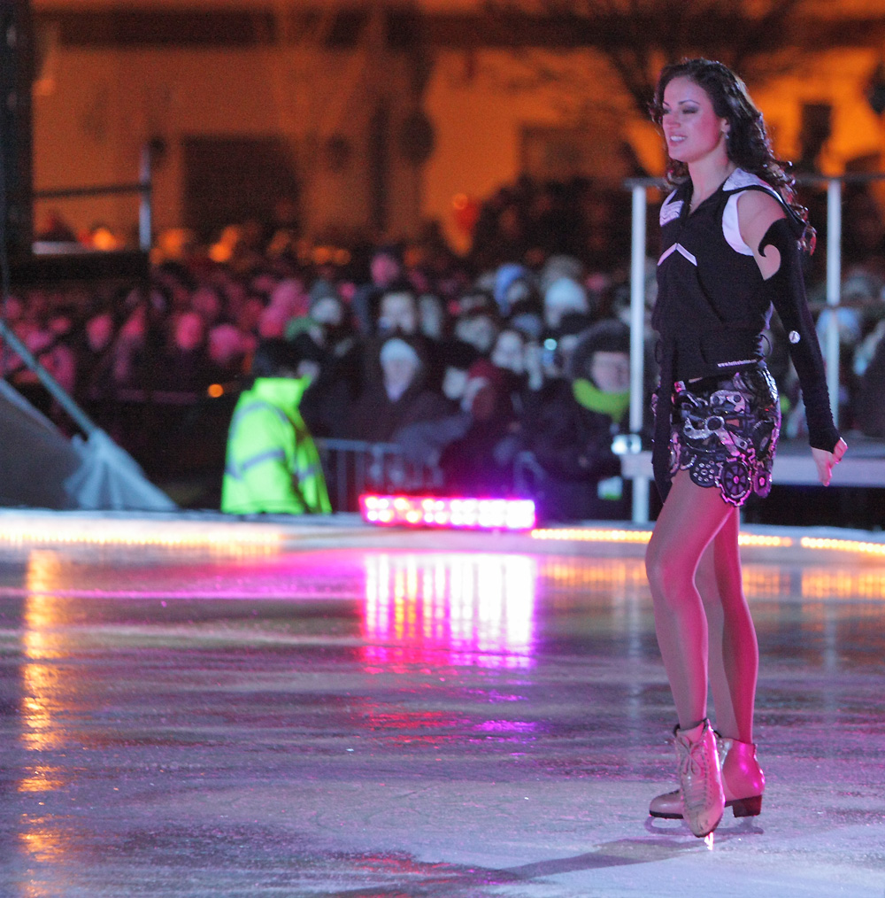 Margarita Drobiazko Vilniuje, Rotušės aikštėje surengtame spektaklyje "Ledo misterija".